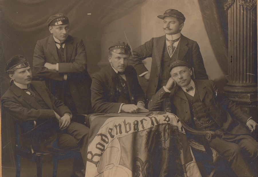 Praesidium Rodenbach's Vrienden: vlnr. zittend hoofdredacteur Hoogstudent Albert Kluyskens, praeses Jules Storme en ab-actis Adiel Debeuckelaere